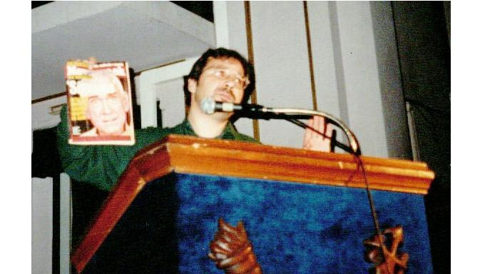 Argentine Journalist Alejandro Agostinelli